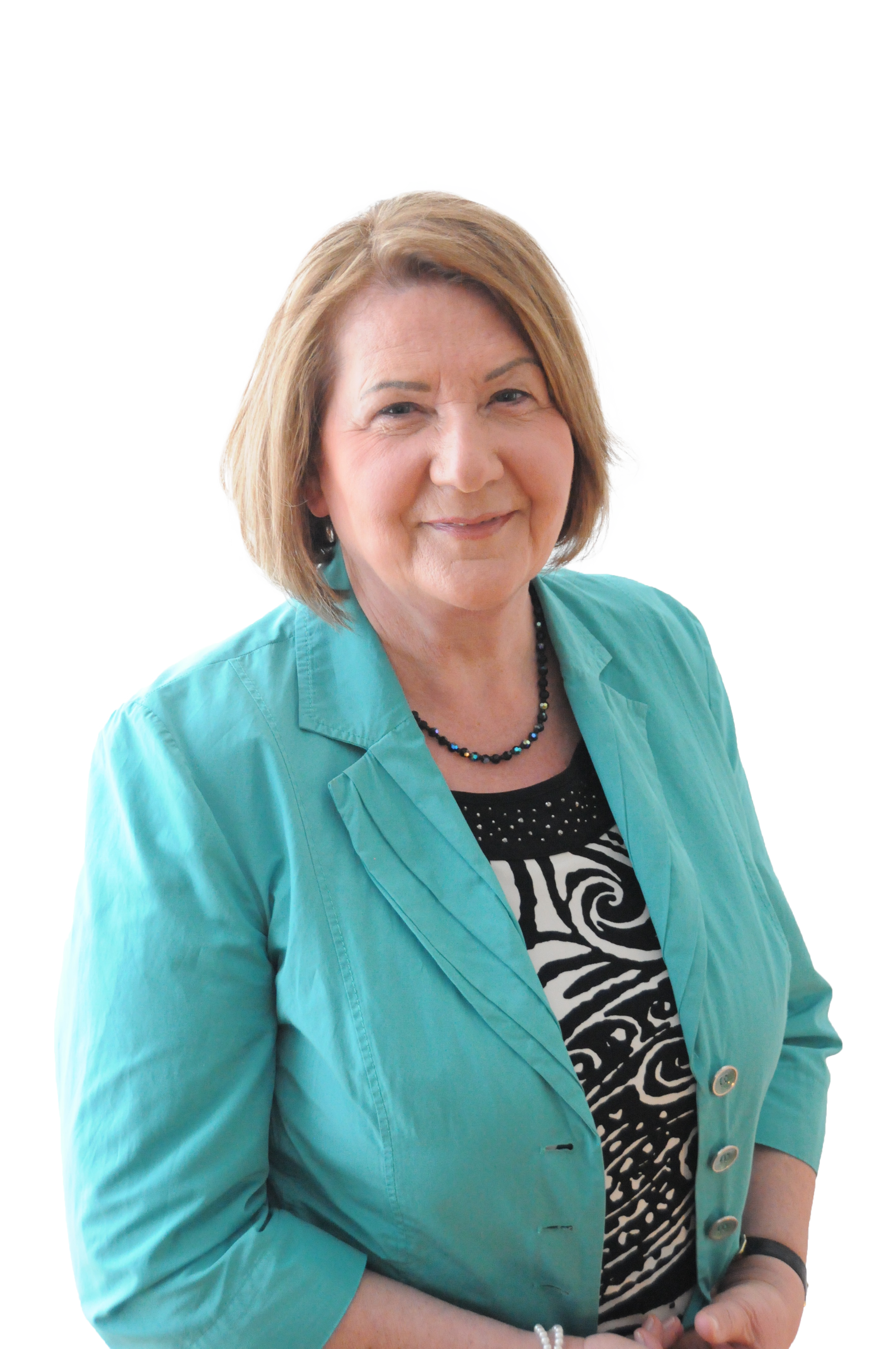 Eva Gottstein